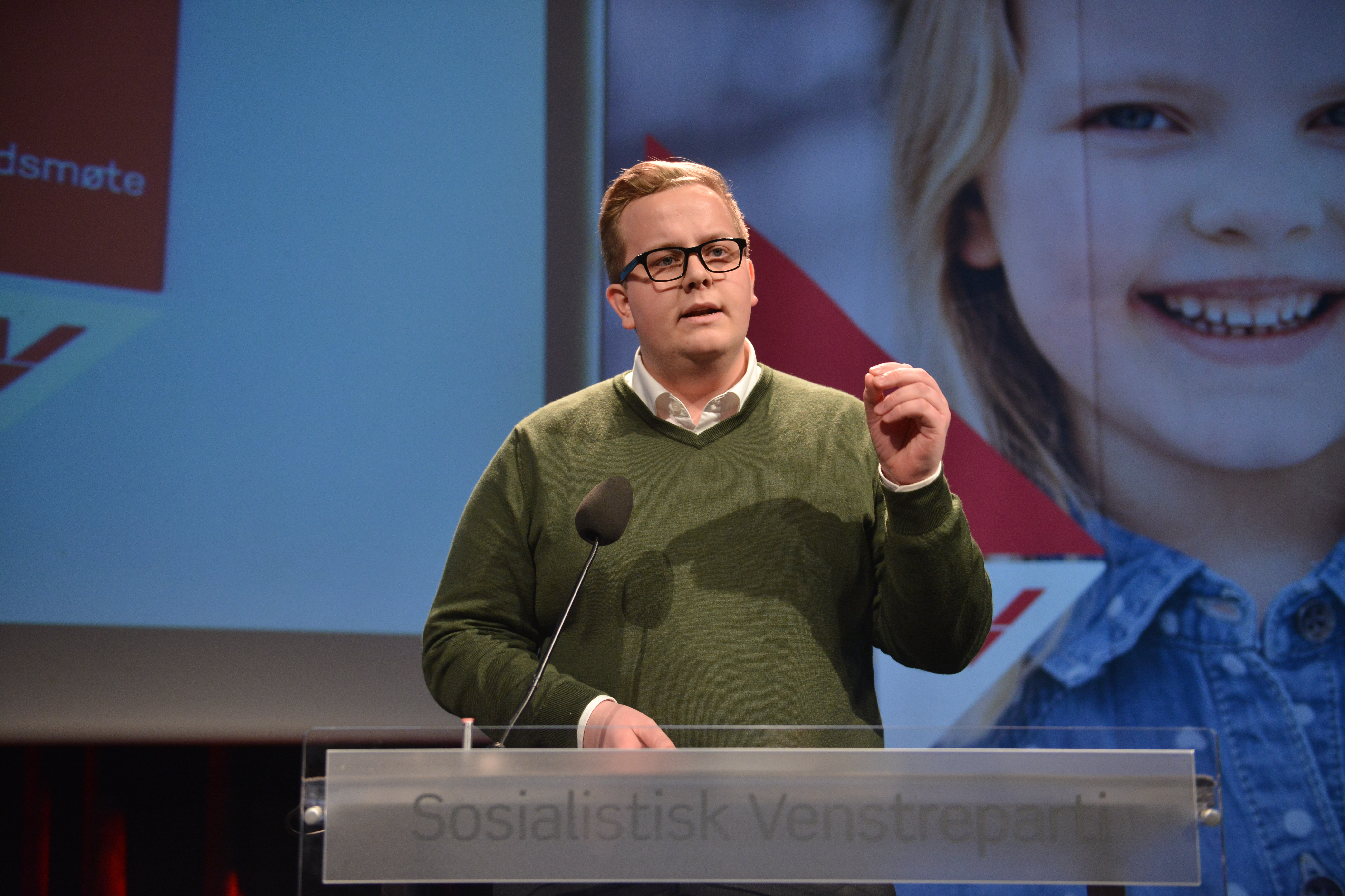 Eirik Faret Sakariassen under Svs landsmøte i 2015